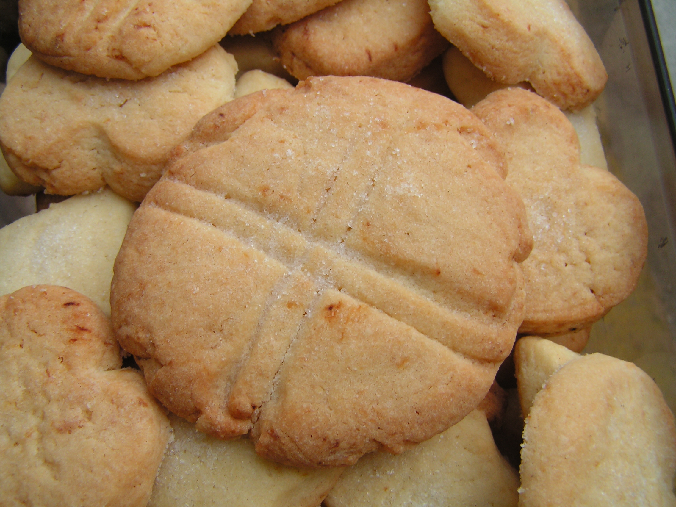 Coquetes beneïdes